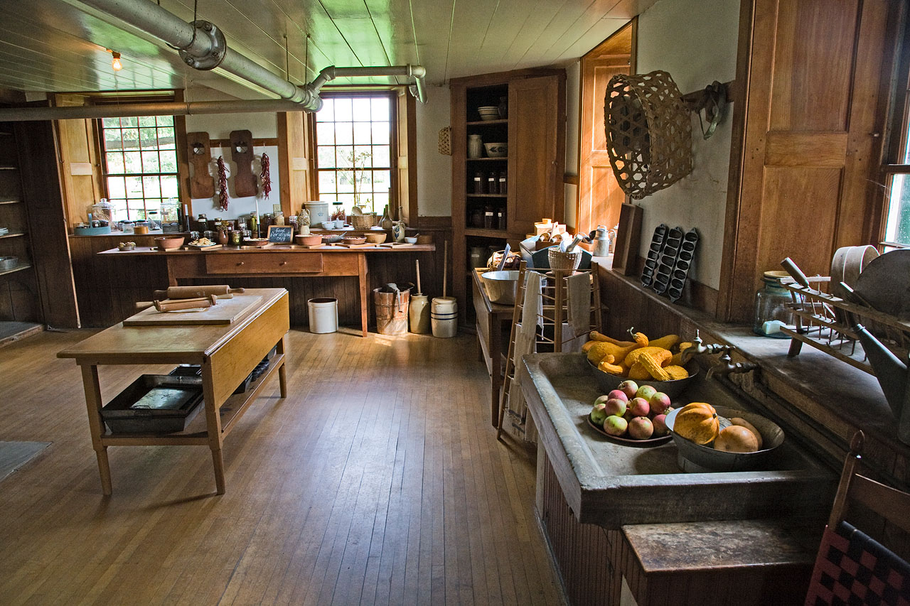 Hancock Shaker village, Massachusetts,USA IMG_1941